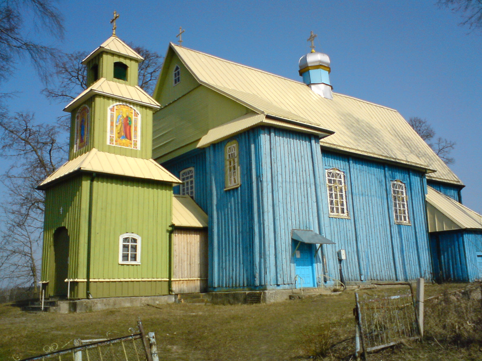 Беларуская (тарашкевіца): Сьвята-Петрапаўлаўская царква са званіцай. в. Валеўка This is a photo of Belarusian heritage monument. Reference number: 412Г000445 ( WLM)